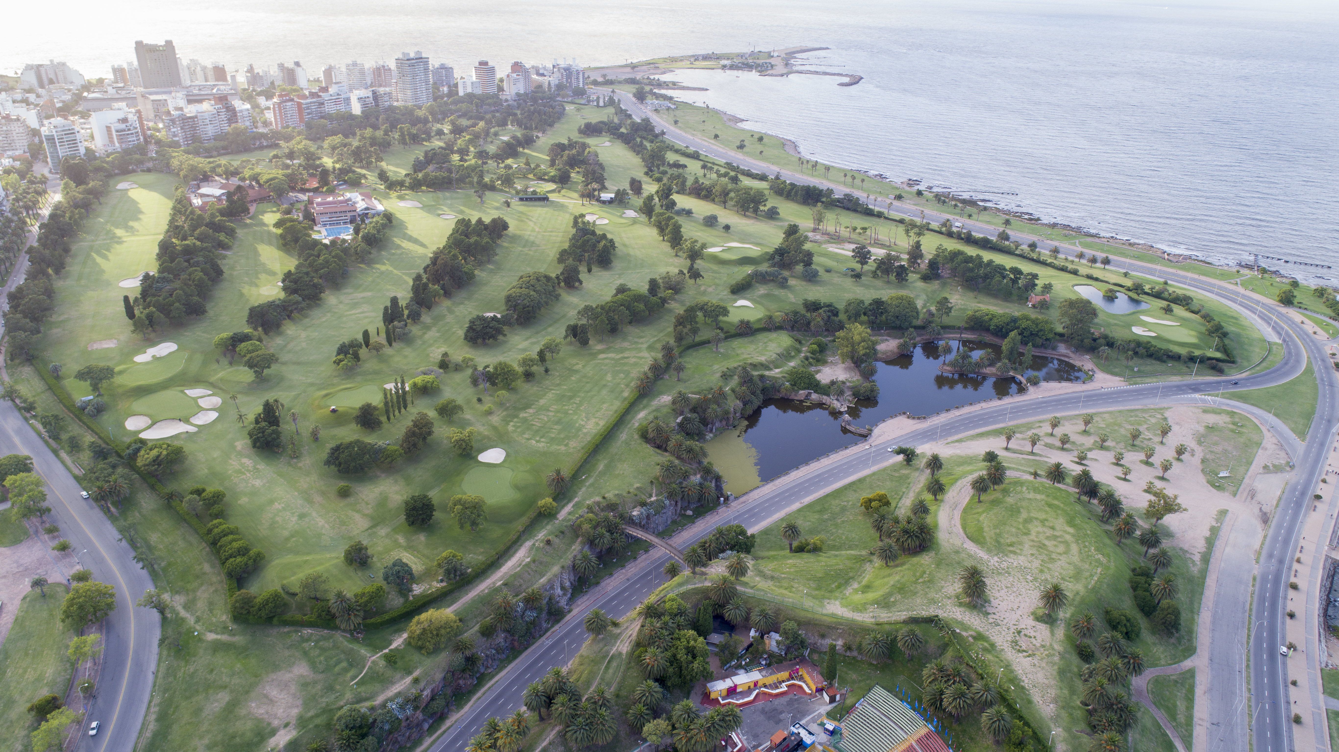 Club de Golf Montevideo, Uruguay